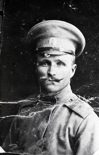 Aleksander Käo, üks Saaremaa mässu juhte